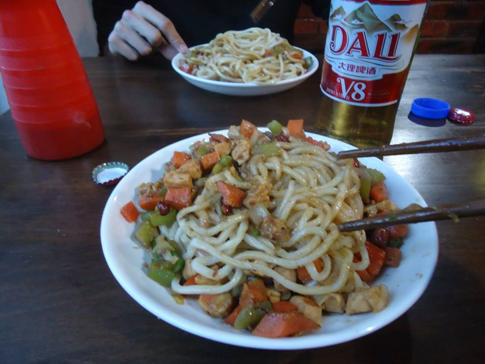 Dos plats de gōng bǎo jī dīng lāo miàn (fideus amb pollastre gōng bǎo) servits a la ciutat de Dali.